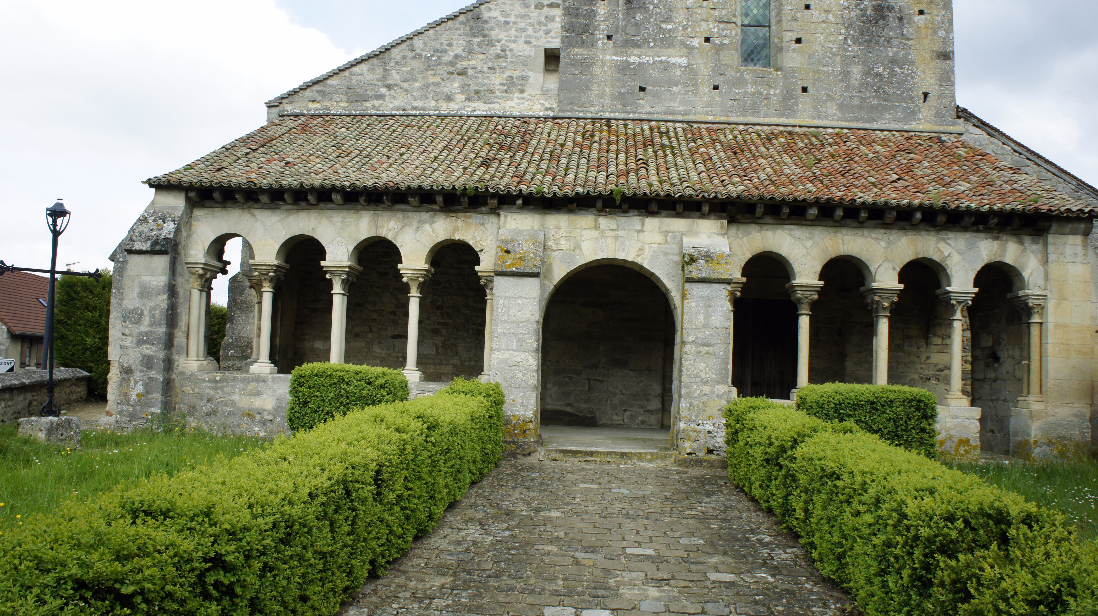 Porche galerie de l'église Saint-Hilaire de st-Thierry.